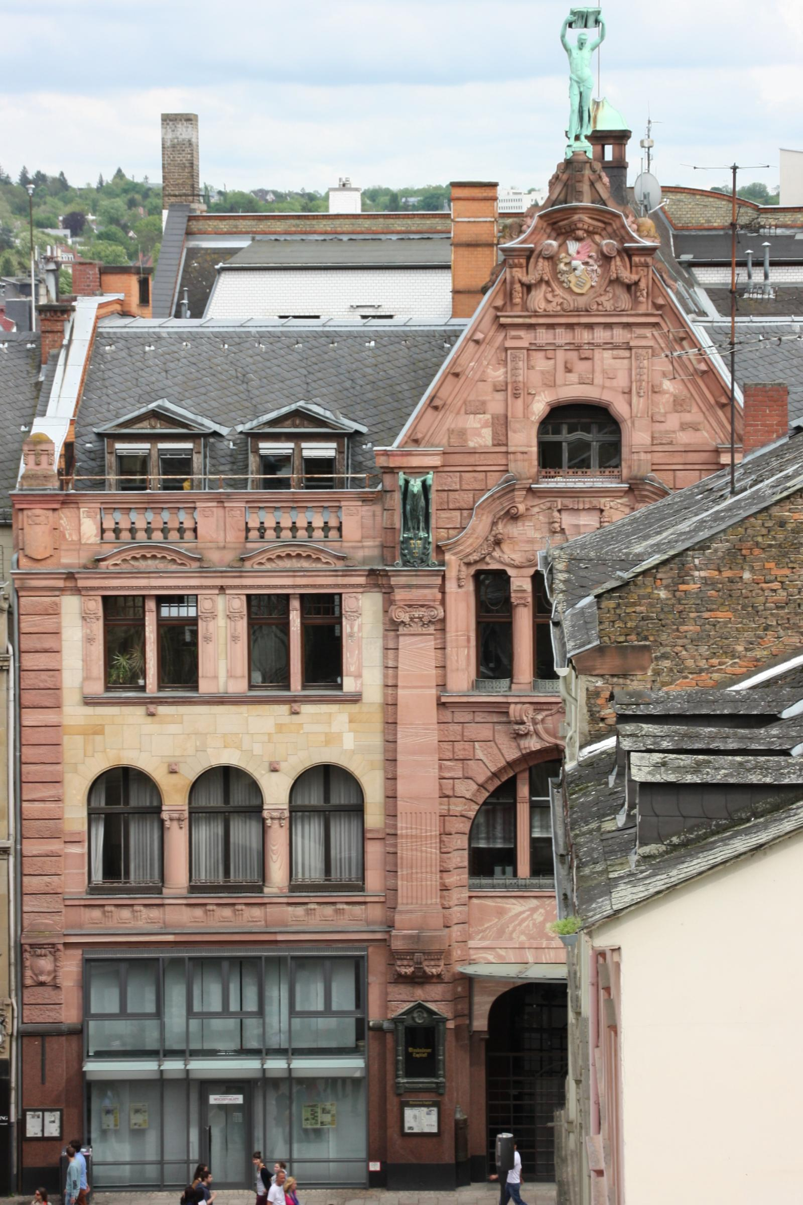 Gebäudehälfte des Pressehaus in Wiesbaden, Hessen, Deutschland. Die andere Gebäudehälfte des Gebäude ist durch die Bebauung verdeckt. Erbaut 1909